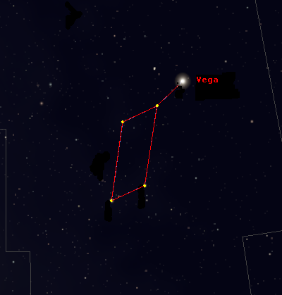 Costellazione della Lira